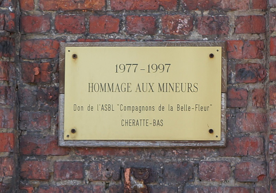 Le charbonnage du Hasard de Cheratte: plaque commemorative.